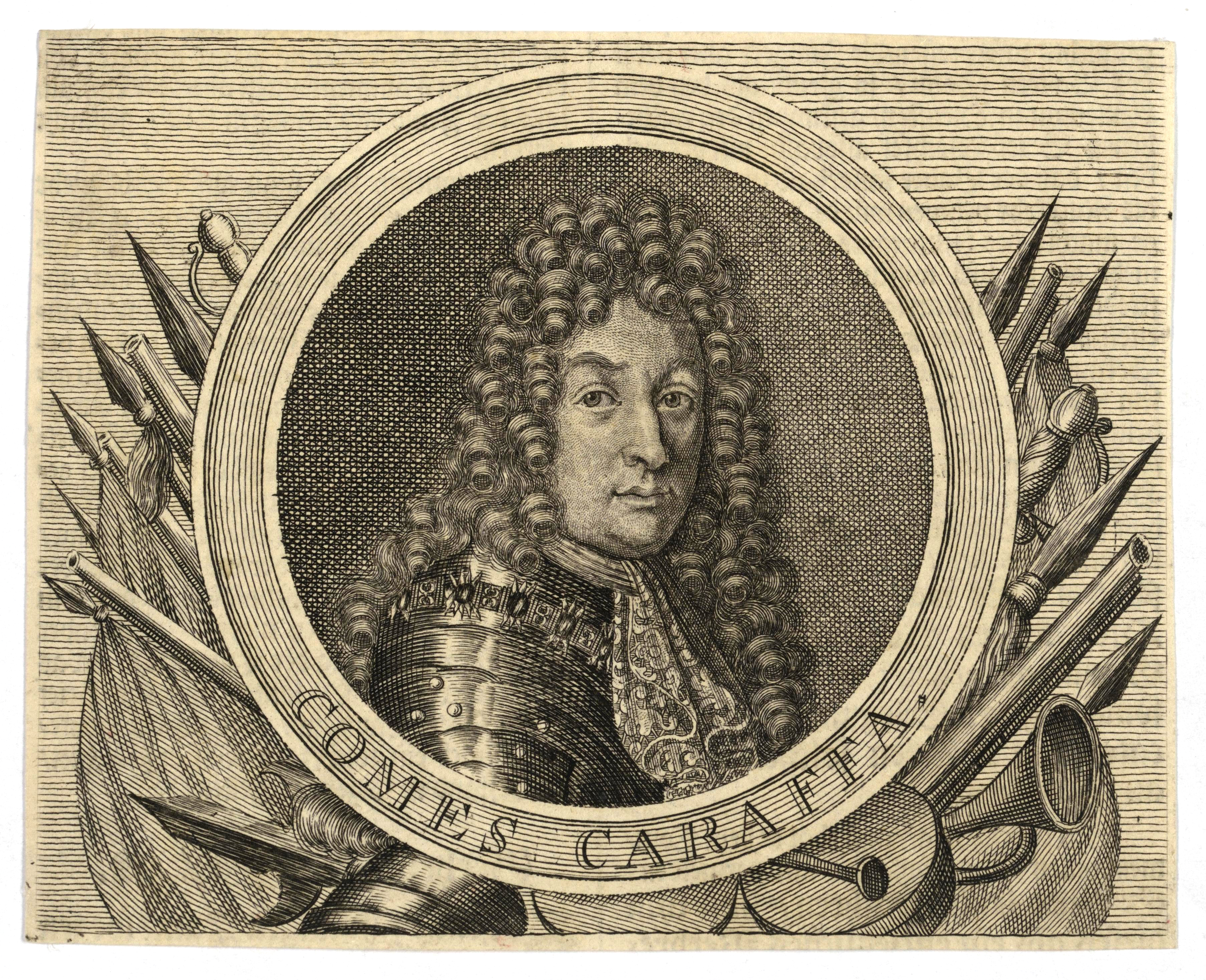 Comes Caraffa (Antonio von Caraffa). Kupferstich. 112 x 144 mm. Münster, LWL-Landesmuseum für Kunst und Kulturgeschichte, Porträtarchiv Diepenbroick, Inventar-Nr. C-593493 PAD